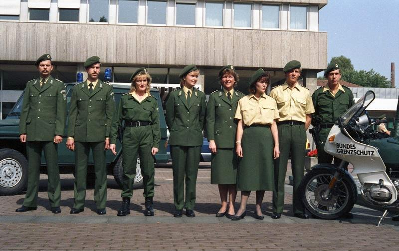 17.8.1987 Parlamentarischer Staatssekretär Carl-Dieter Spranger stellt die neuen Uniformen der künftigen Polizeivollzugsbeamtinnen des Bundesgrenzschutzes (die ersten 30 werden am 1.10.1987 ihre Ausbildung beginnen) vor - im Bundesministerium des Innern